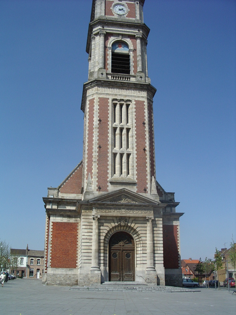 Eglise Saint Martin Harnes